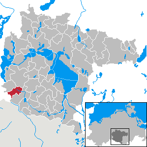 Altenhof in Mecklenburg-Western Pomerania - District Müritz